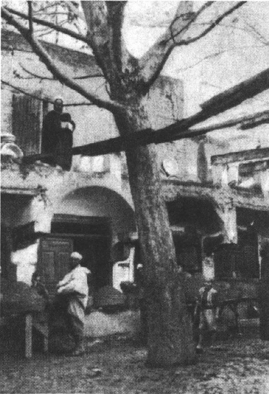 le Souk EL Henna en 1911.